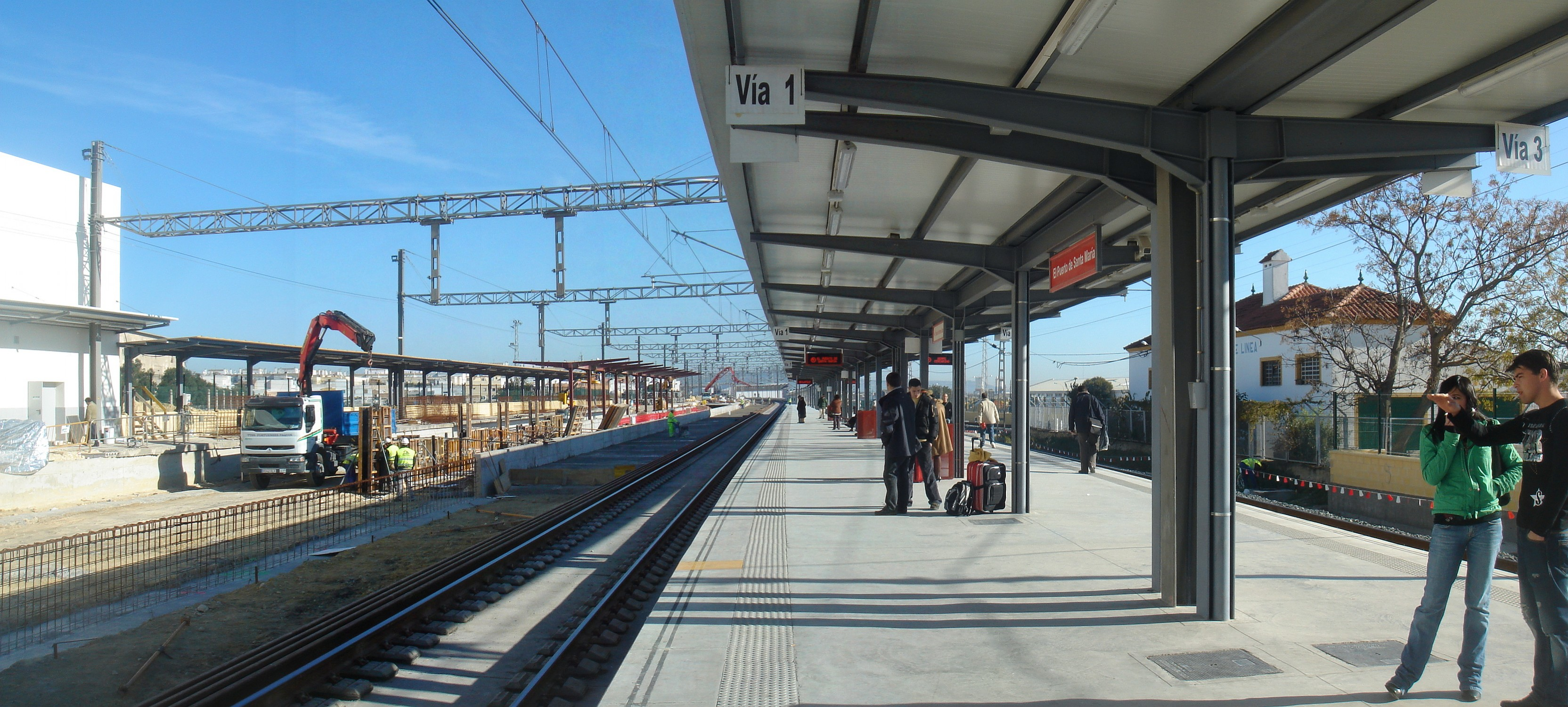 Vista de la construccion de los nuevos andenes de la estacion de ferrocarril de El Puerto de Santa María.